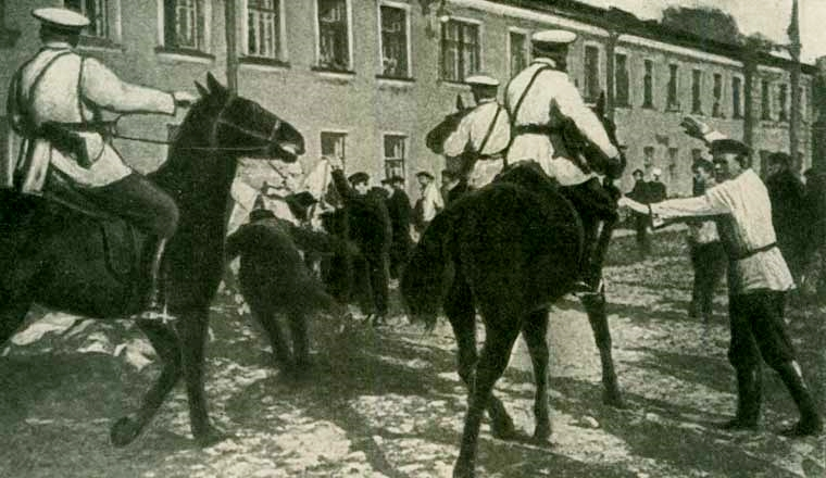 La polizia carica i lavoratori metallurgici in sciopero dell'impianto militare Obuchov di San Pietroburgo. 20 maggio 1901